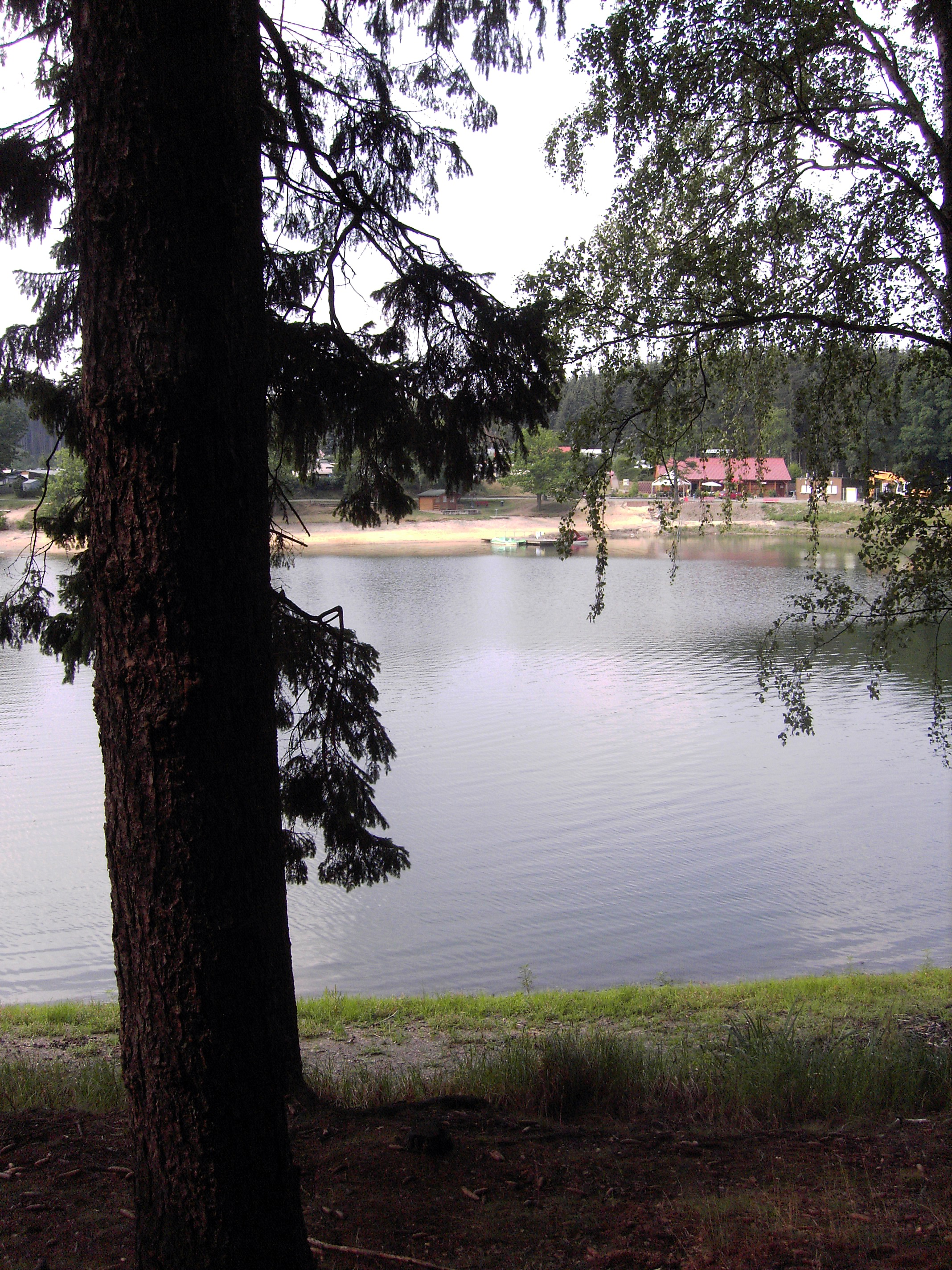 Birnbaumteich, Stausee bei Neudorf (Harz), Sachsen-Anhalt, Deutschland